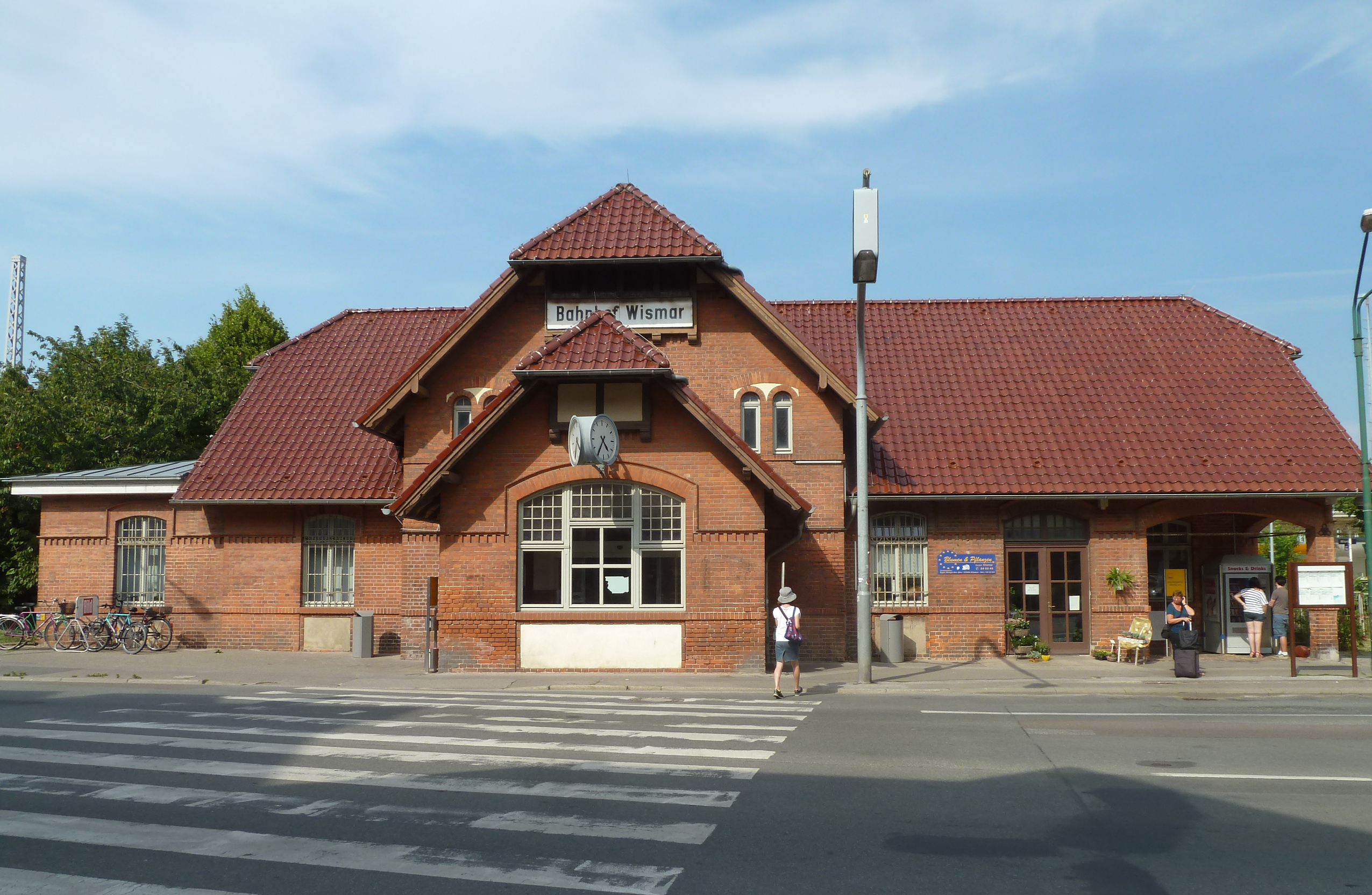 Bahnhof Wismar, denkmalgeschütztes Vorgebäude, Stadtseite